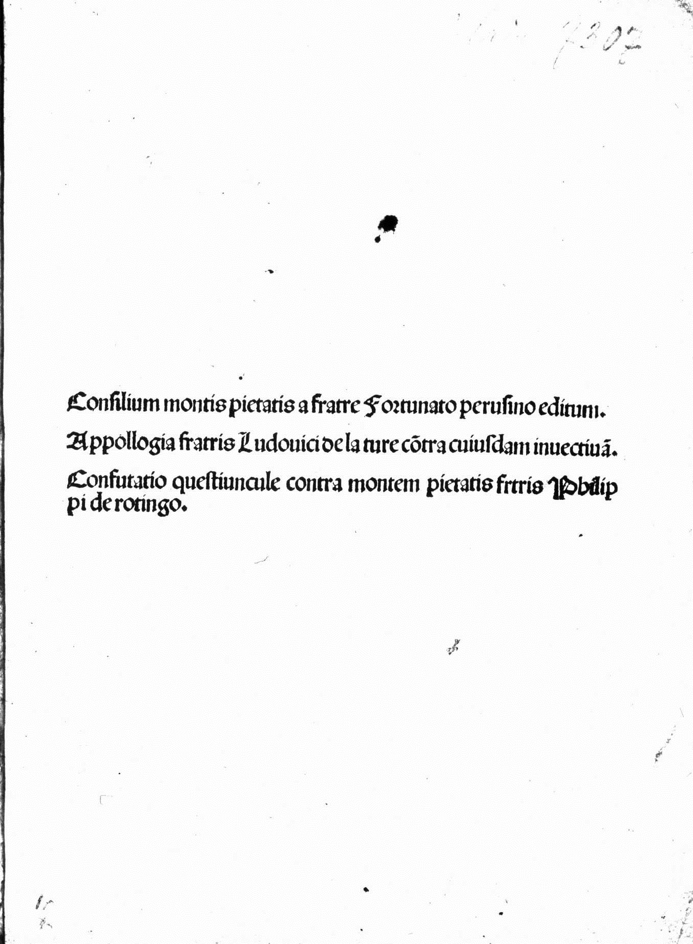 occhietto